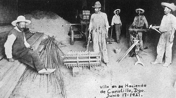 Pancho Villa Canutillóban